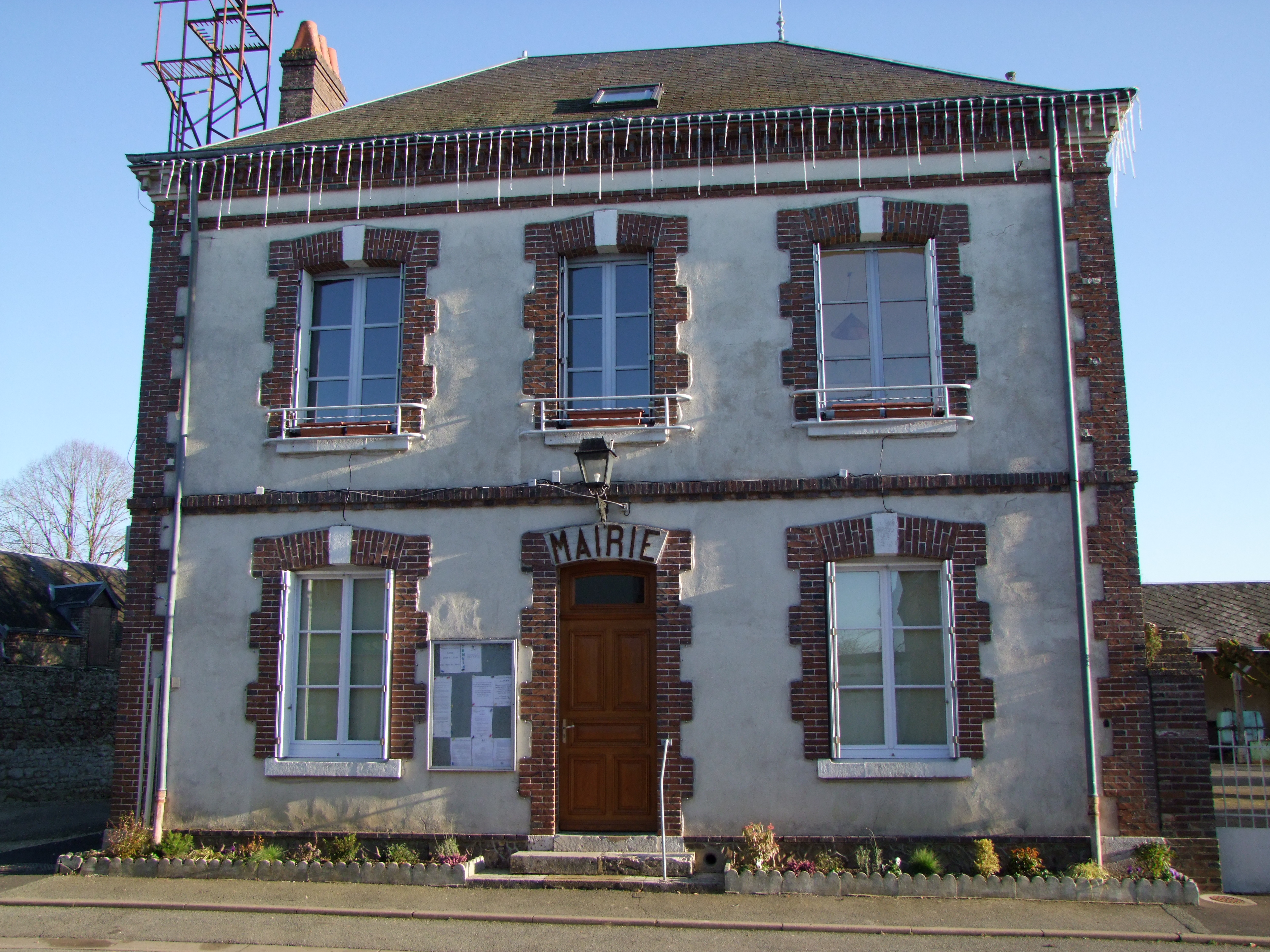 Mairie de la commune de Gault-du-Perche